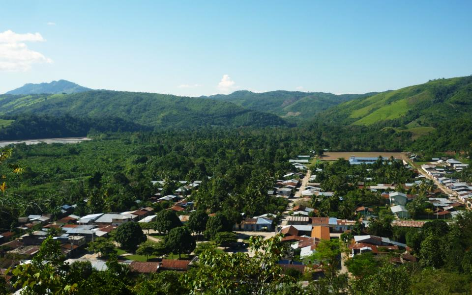 el pueblo mas antiguo de la provincia de Mariscal Caceres y el 6to a nivel regional